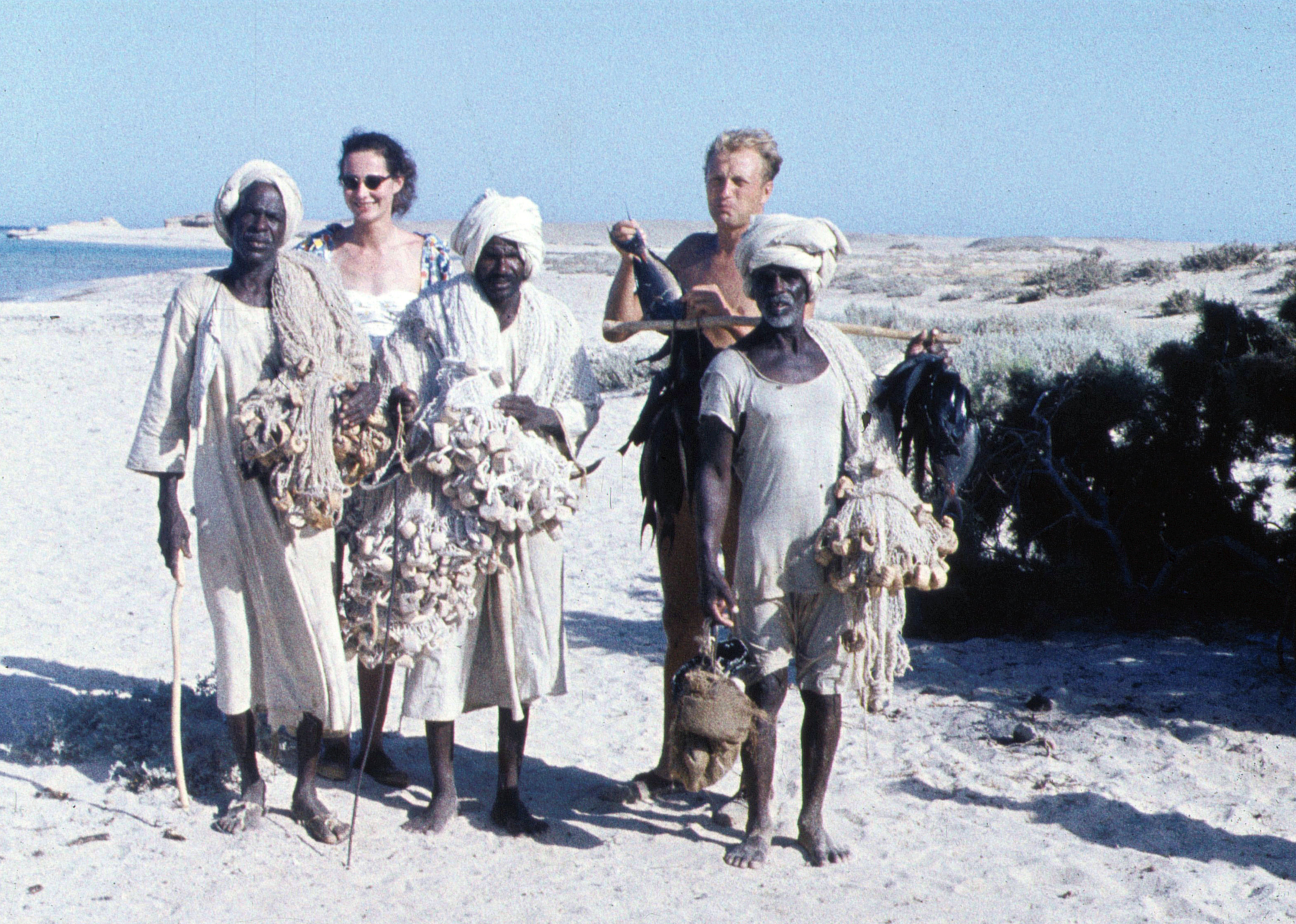 Ababda-Fischer am Strand von Kosseir (1960)